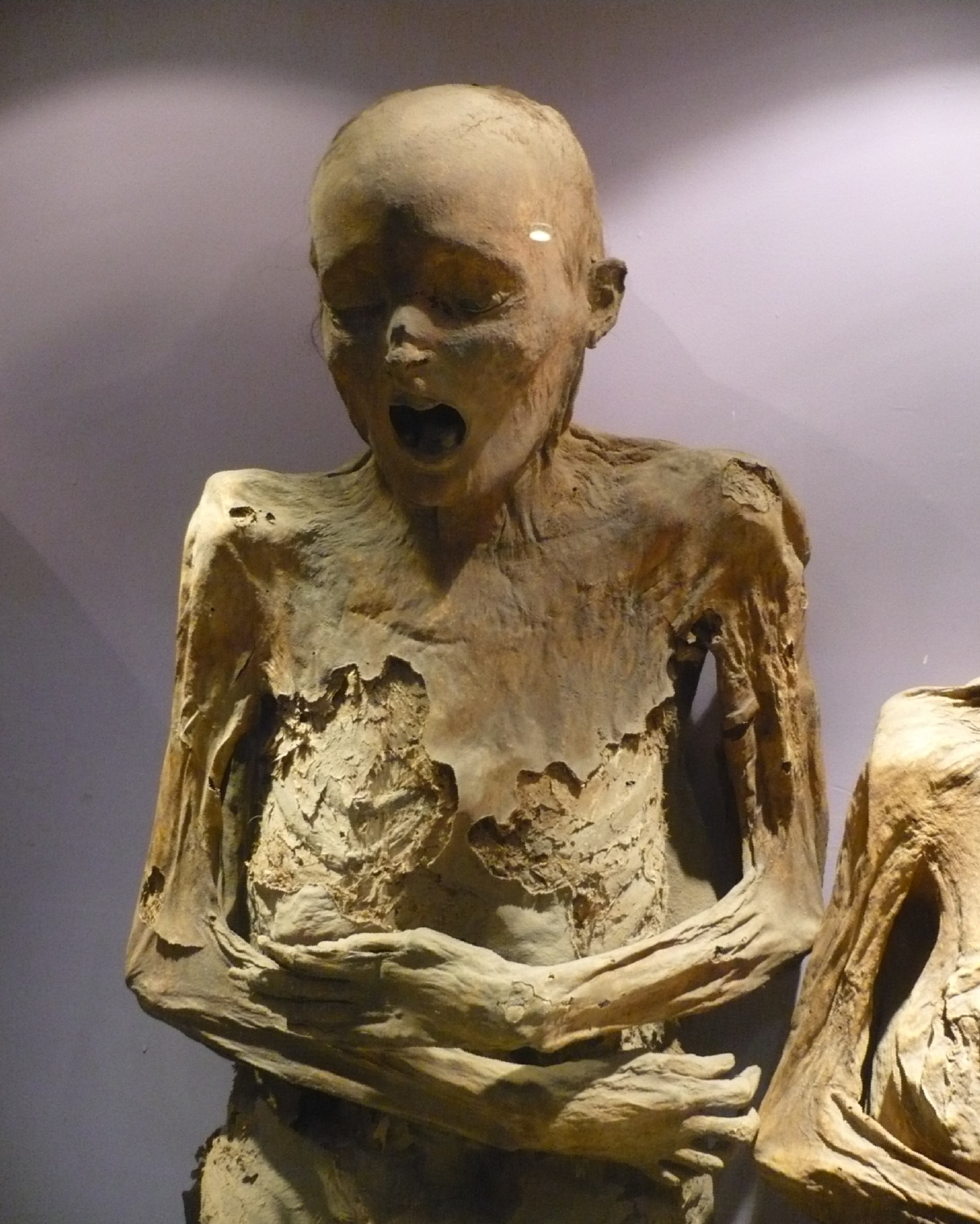 Momia de Guanajuato, México